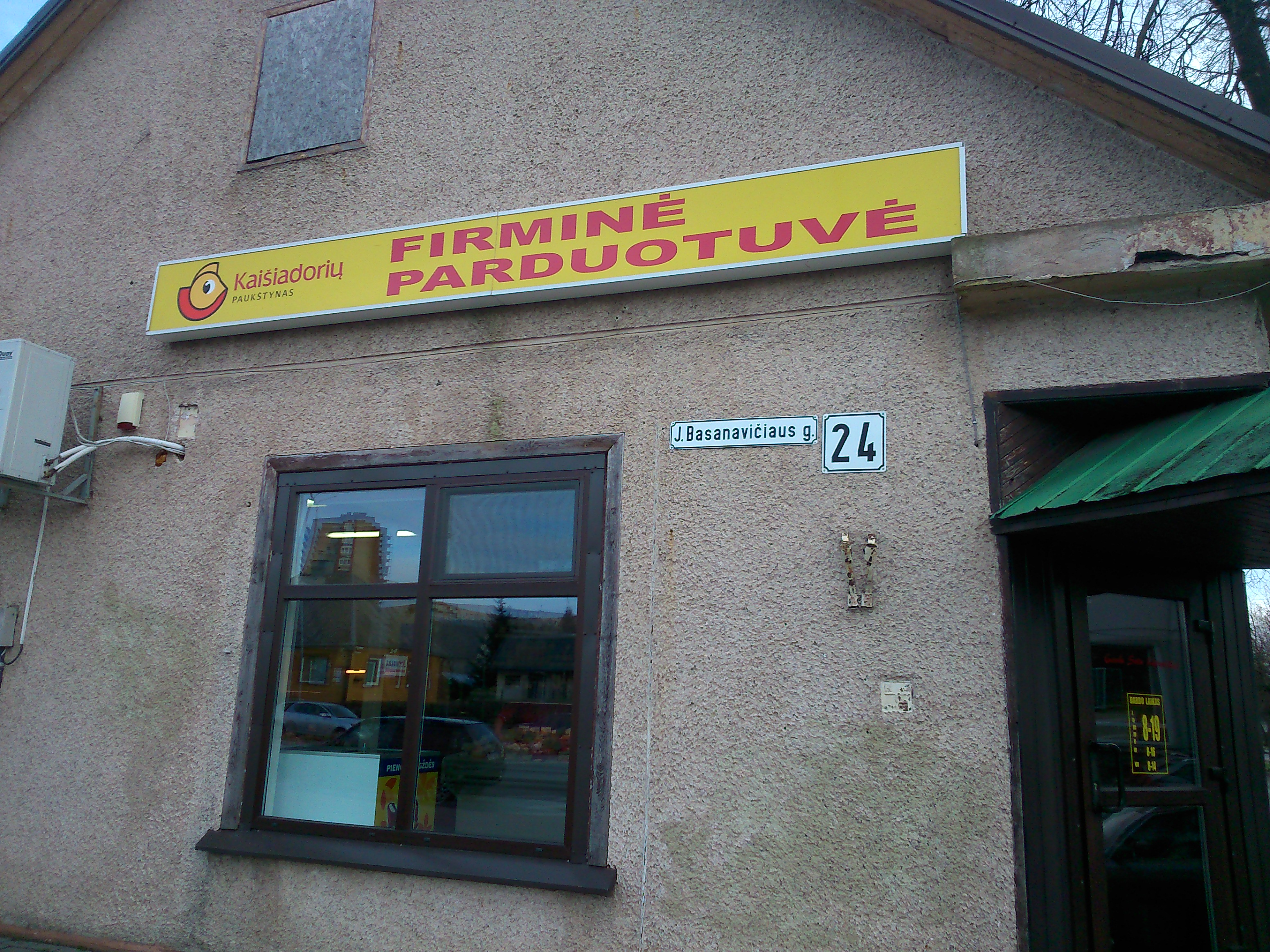 Kaisiadoriu paukstynas, Jonava